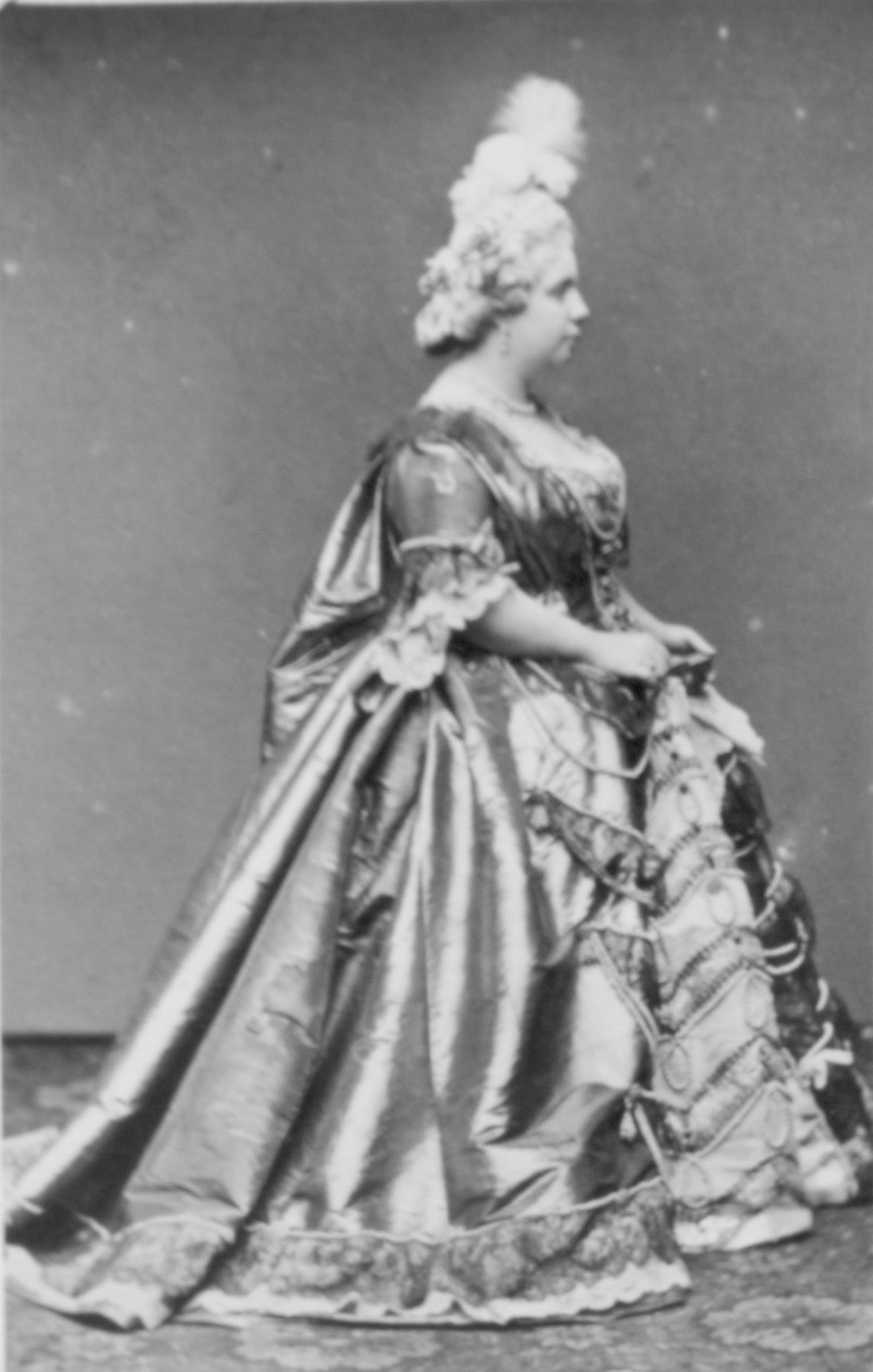 Infanta Amalia de Borbón, Prinzessin von Bayern.